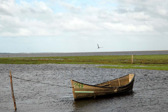 Parque Nacional da Lagoa do Peixe em Tavares, Rio Grande do Sul.